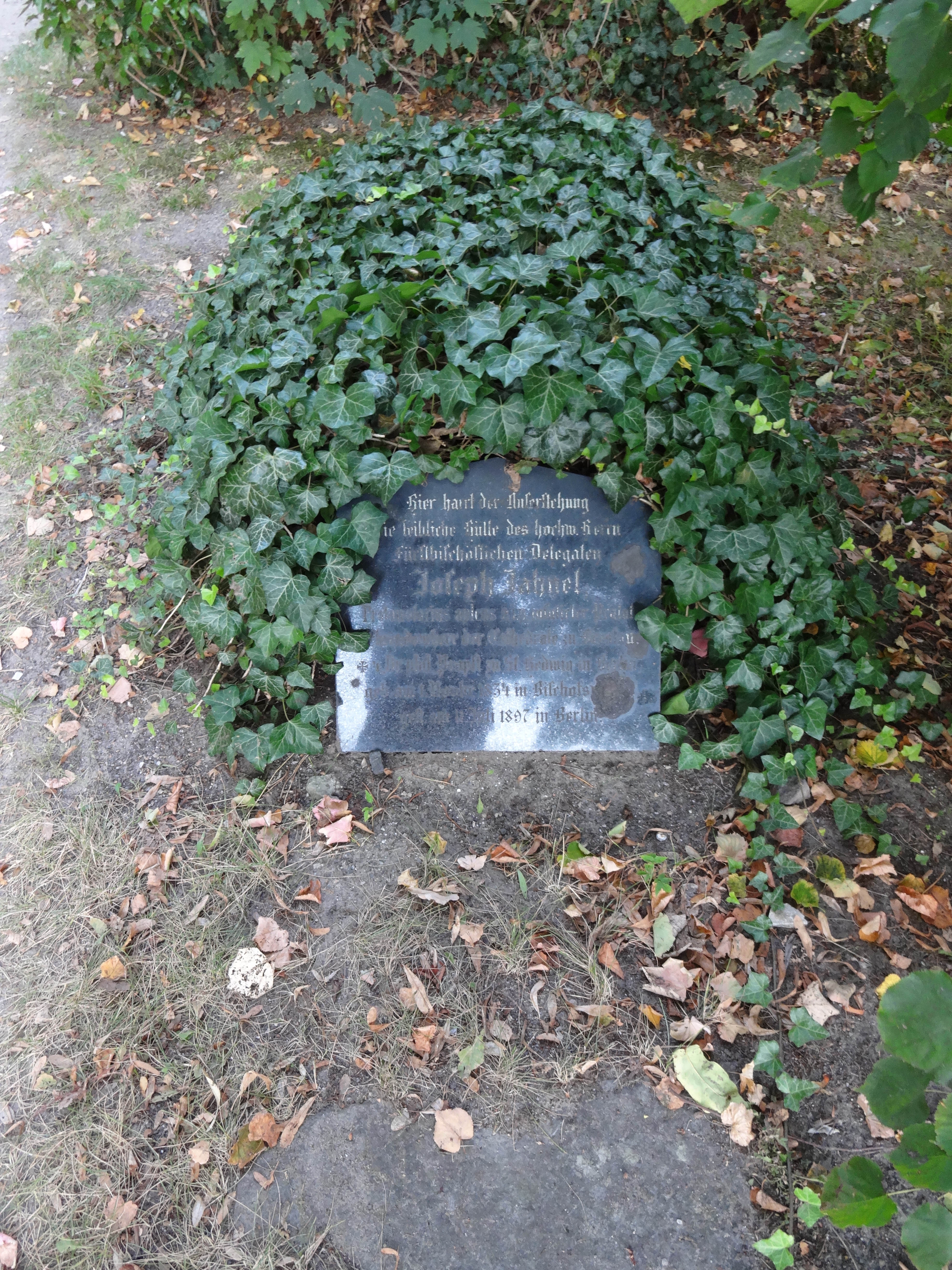 Grab von Joseph Jahnel auf dem Alten Domfriedhof der St.-Hedwigsgemeinde in der Liesenstraße in Berlin